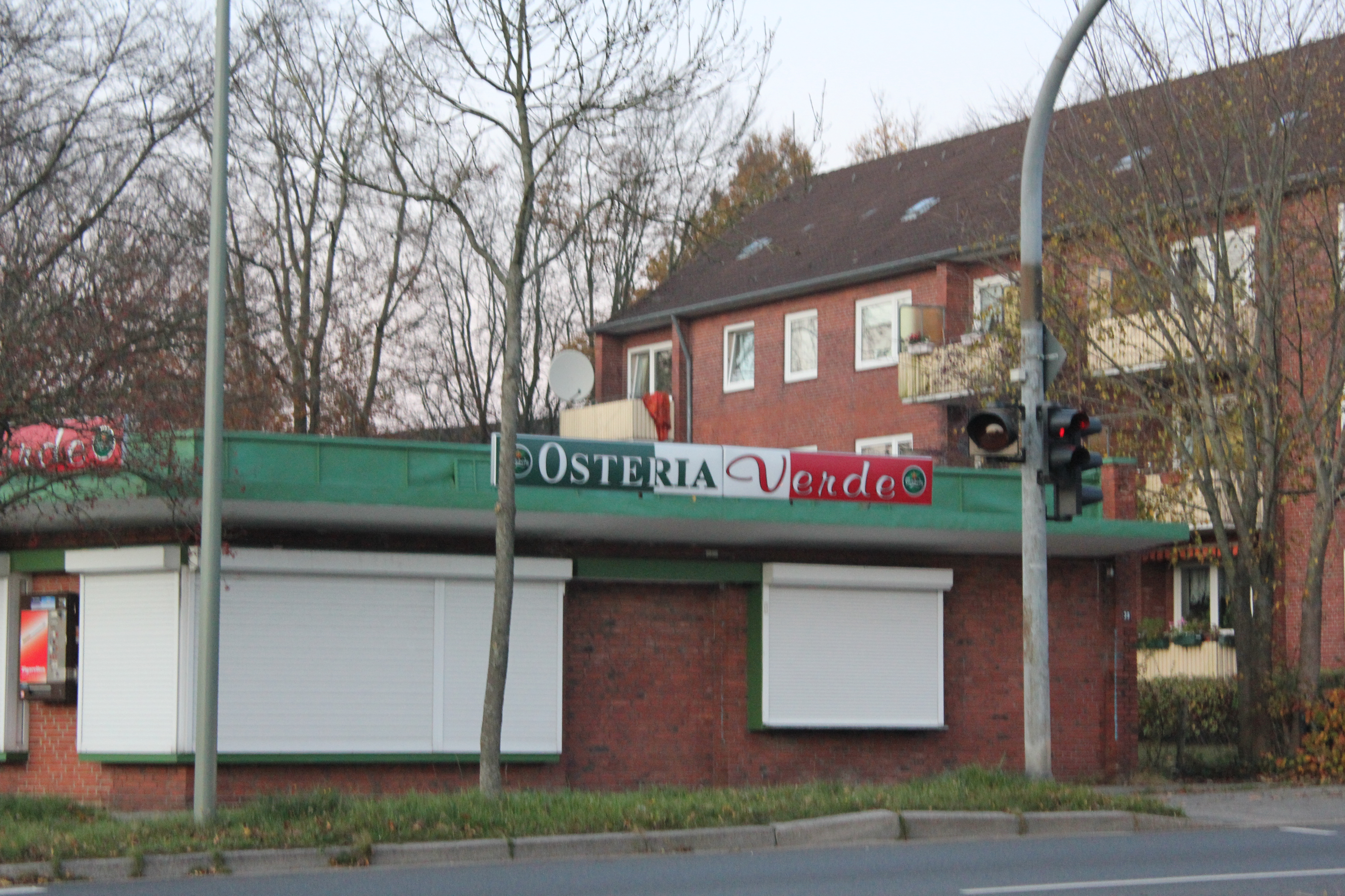 Osteria, gegenüber der Sportschule, nahe Twedter Plack (Flensburg 2011); bald darauf war eine Versicherung oder sowas im Gebäude